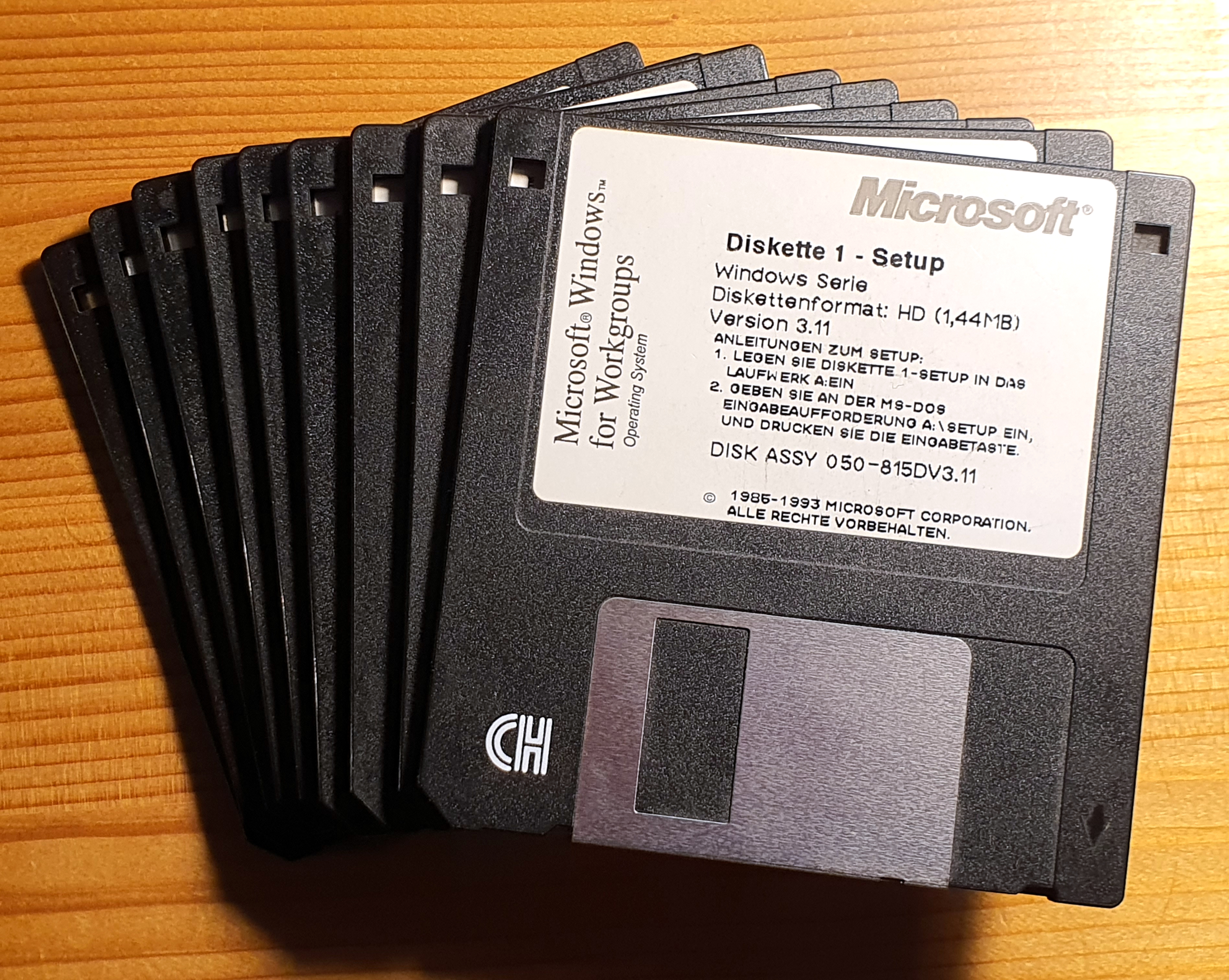 Microsoft Windows for Workgroups 3.11 auf neun 3,5 Zoll HD-Disketten mit je 1,44 MB Speicherkapazität, ohne Schriftartendisketten, 1985-1993 Microsoft Corporation